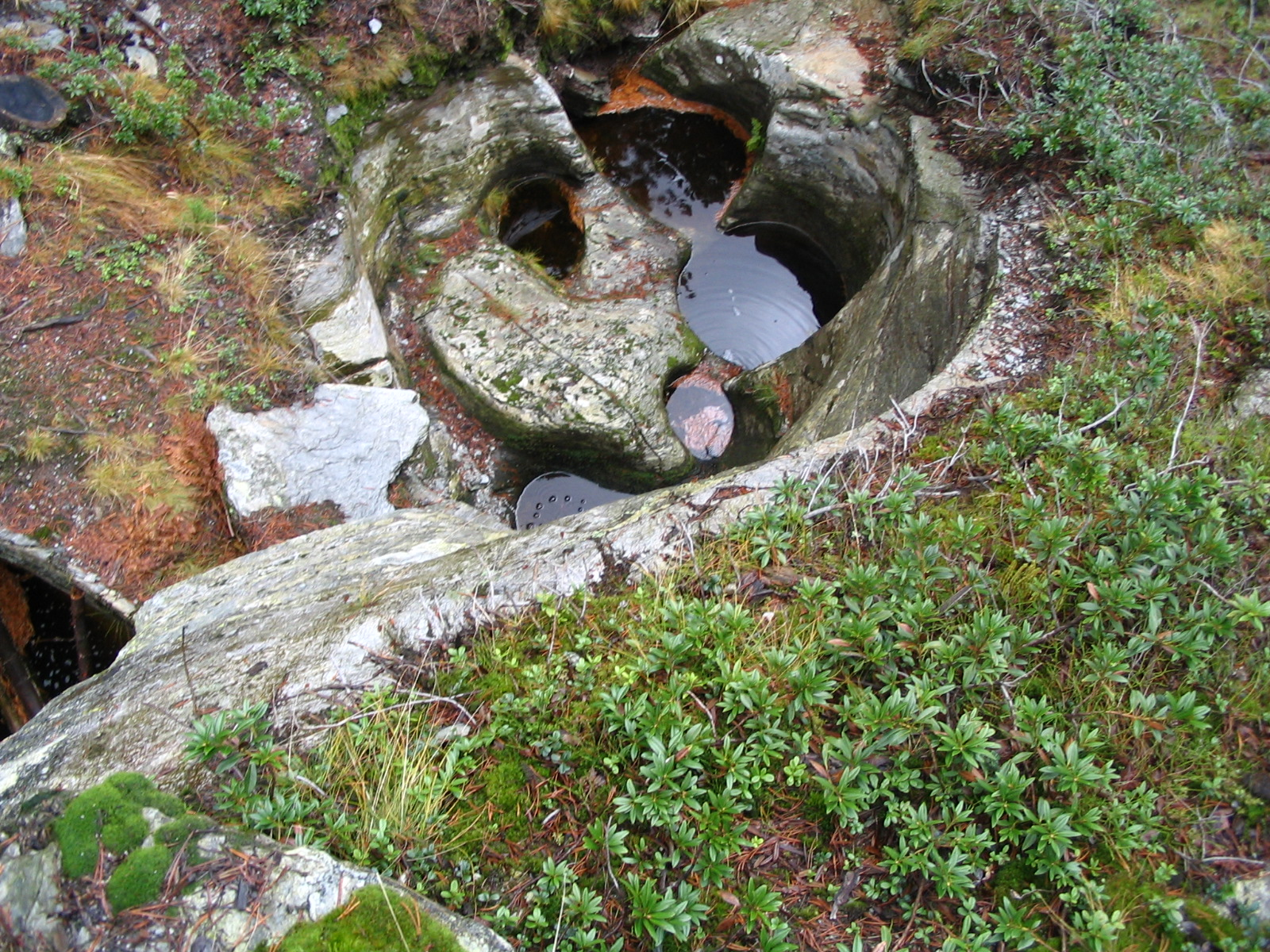 Gletschertöpfe in Maloja, Graubünden.